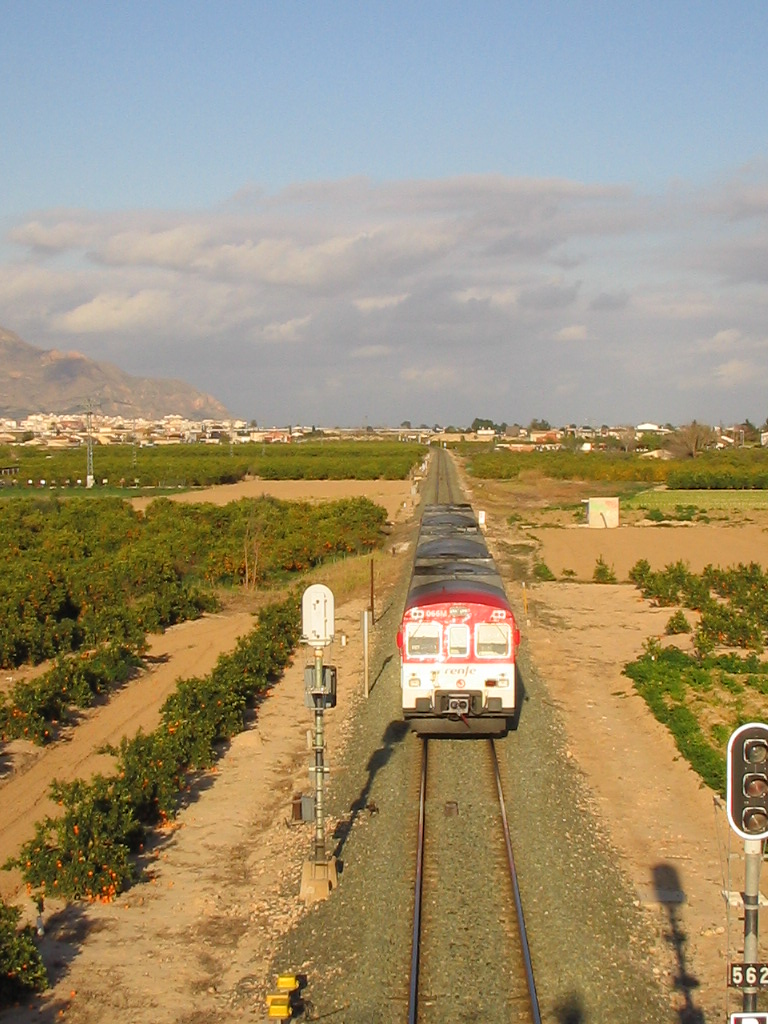 Paso de un tren de Cercanías por Orihuela, concretamente por Desamparados.